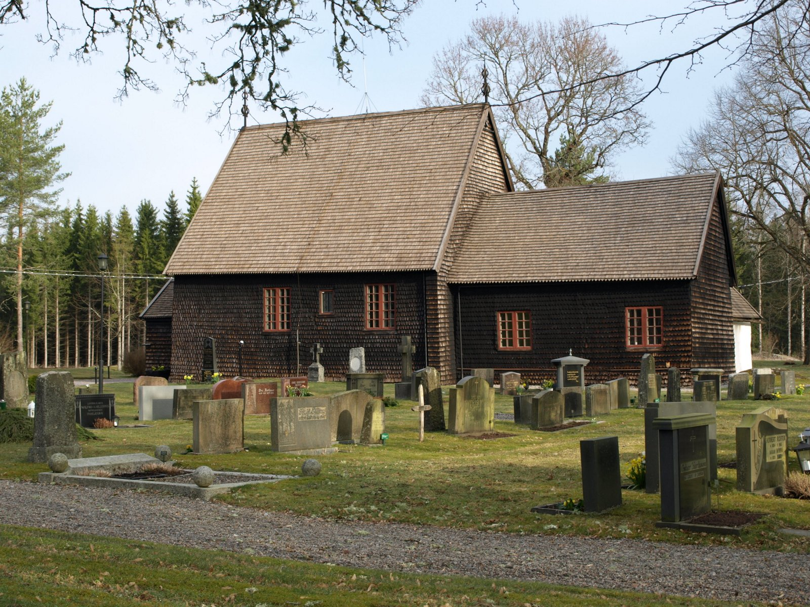 Tångeråsa Kyrka